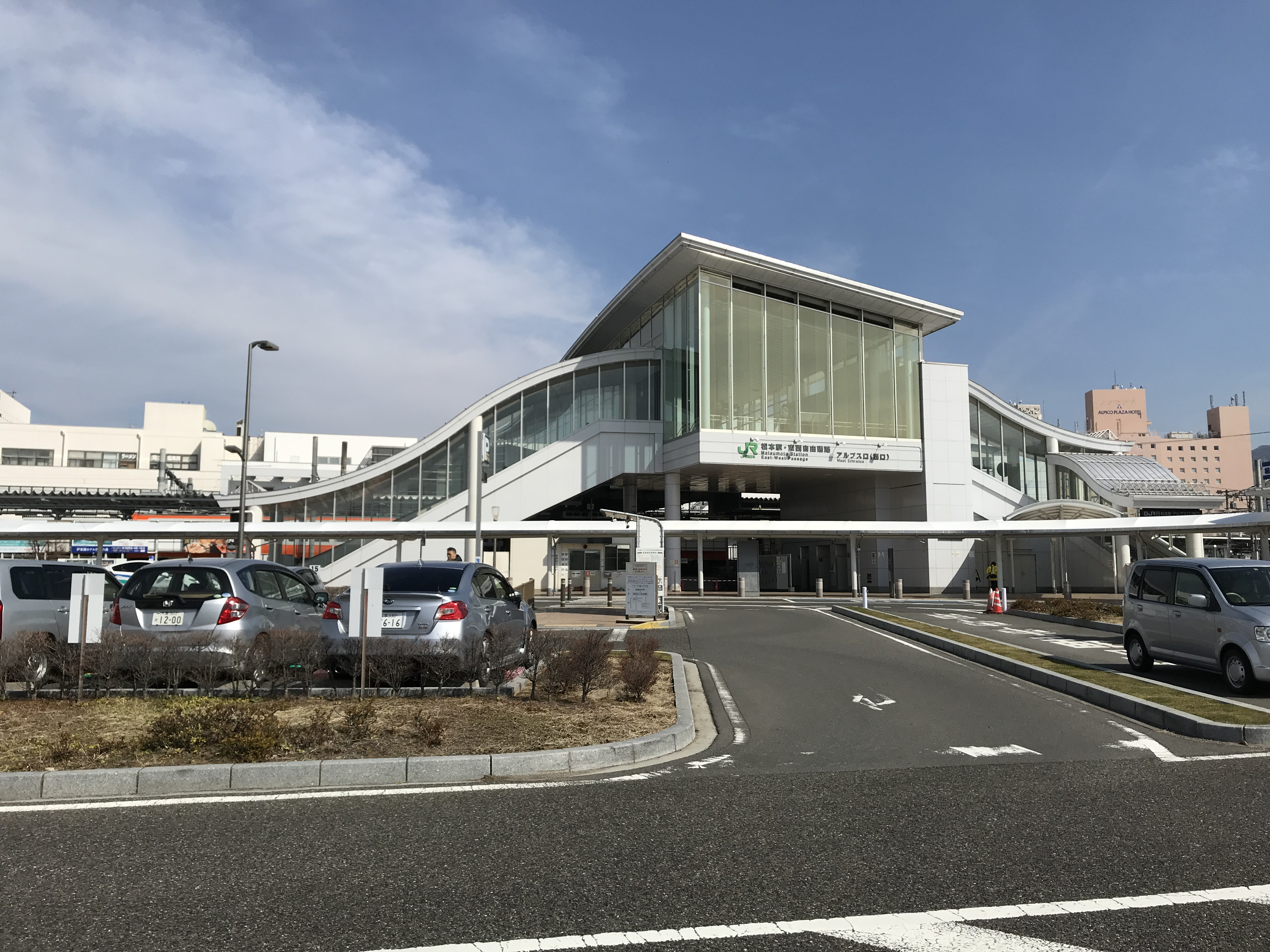 松本駅西口